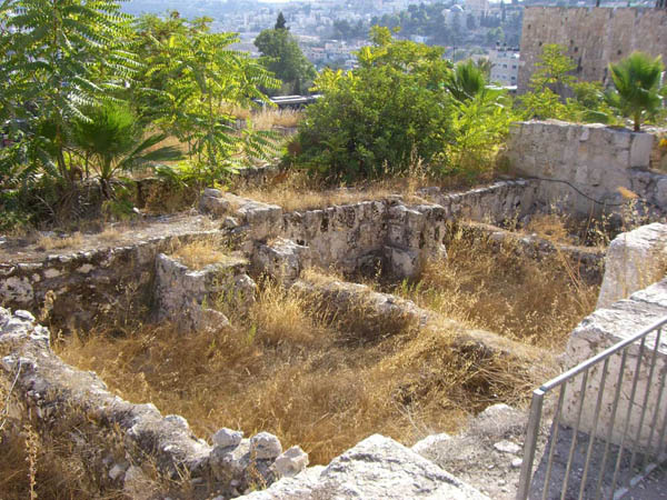 Ofel